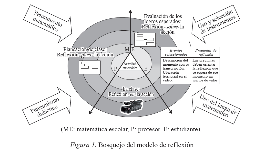 PARADA, S. E., & PLUVINAGE, F. (2014). Reflexiones De Profesores De Matemáticas Sobre Aspectos Relacionados Con Su Pensamiento Didáctico. Revista Latinoamericana de Investigación En Matemática Educativa, 17(1), 83–113.